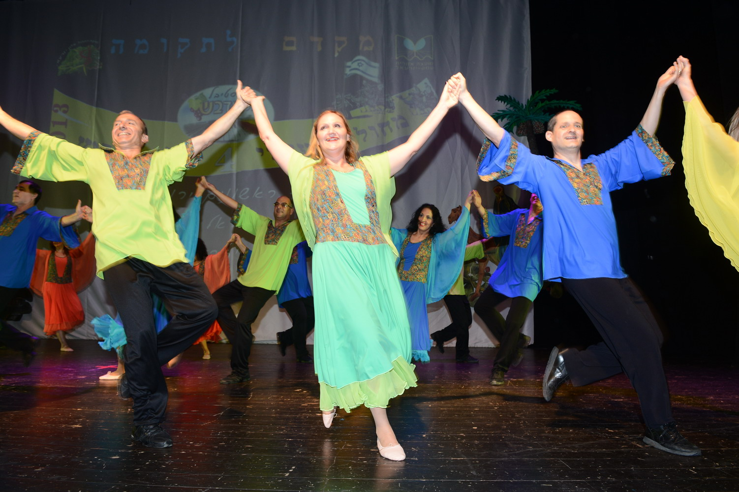 Alon Yizrael